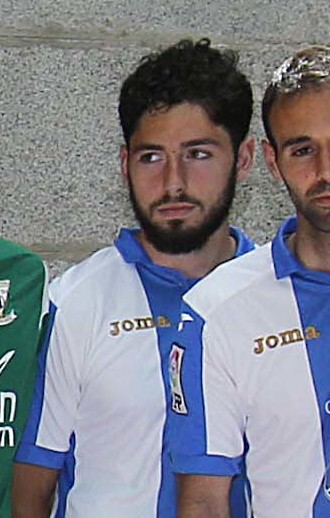 Felicidades pepineros!! Vuestro ascenso a Primera es la historia de un sueño, el resultado de vuestro trabajo y esfuerzo. Sois un orgullo para todo Madrid! Enhorabuena CD Leganés. #LeganésEsDePrimera